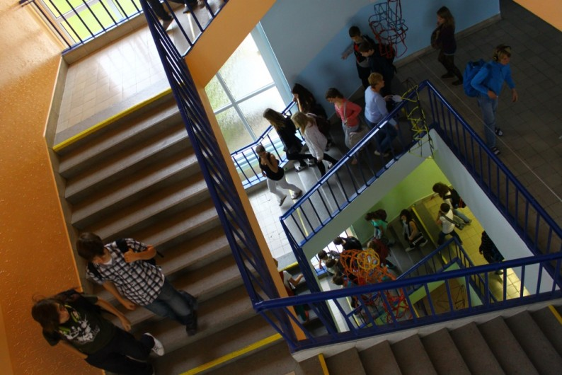 Školní schodiště v Gymnáziu Voděradská